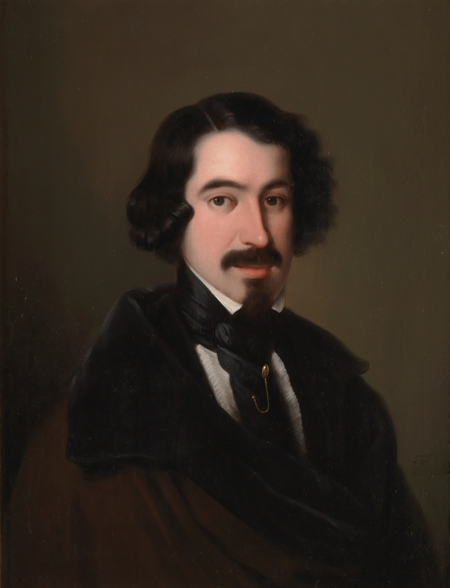 Retrato del escritor y poeta español José de Espronceda (1808-1842).